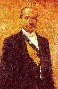 Hermes da Fonseca, oitavo presidente do Brasil (1910-1914) em traje civil, retratado por Henrique Bernardelli (Museu da República, Rio de Janeiro).